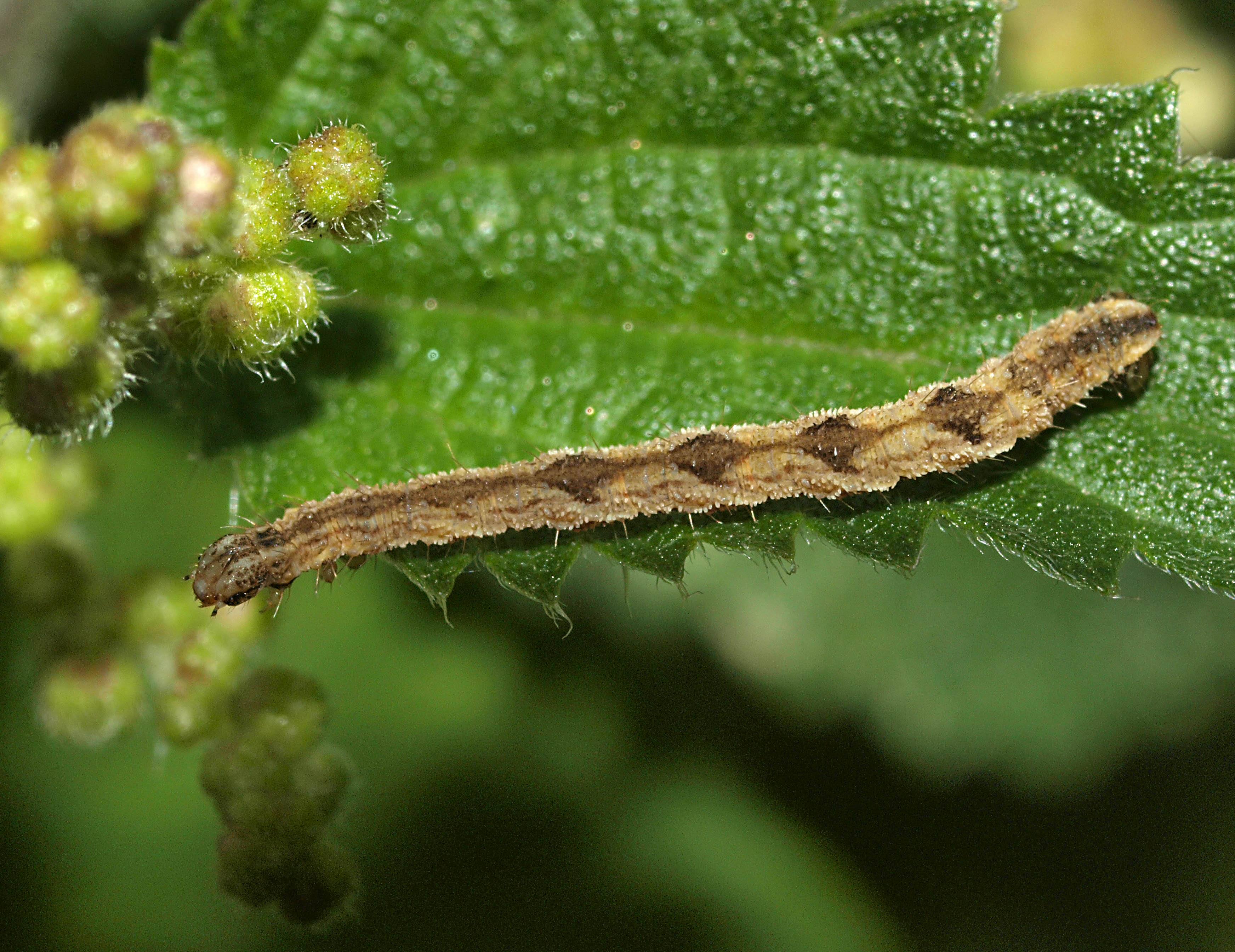 Almindelig Dværgmåler larve på Stor nælde.